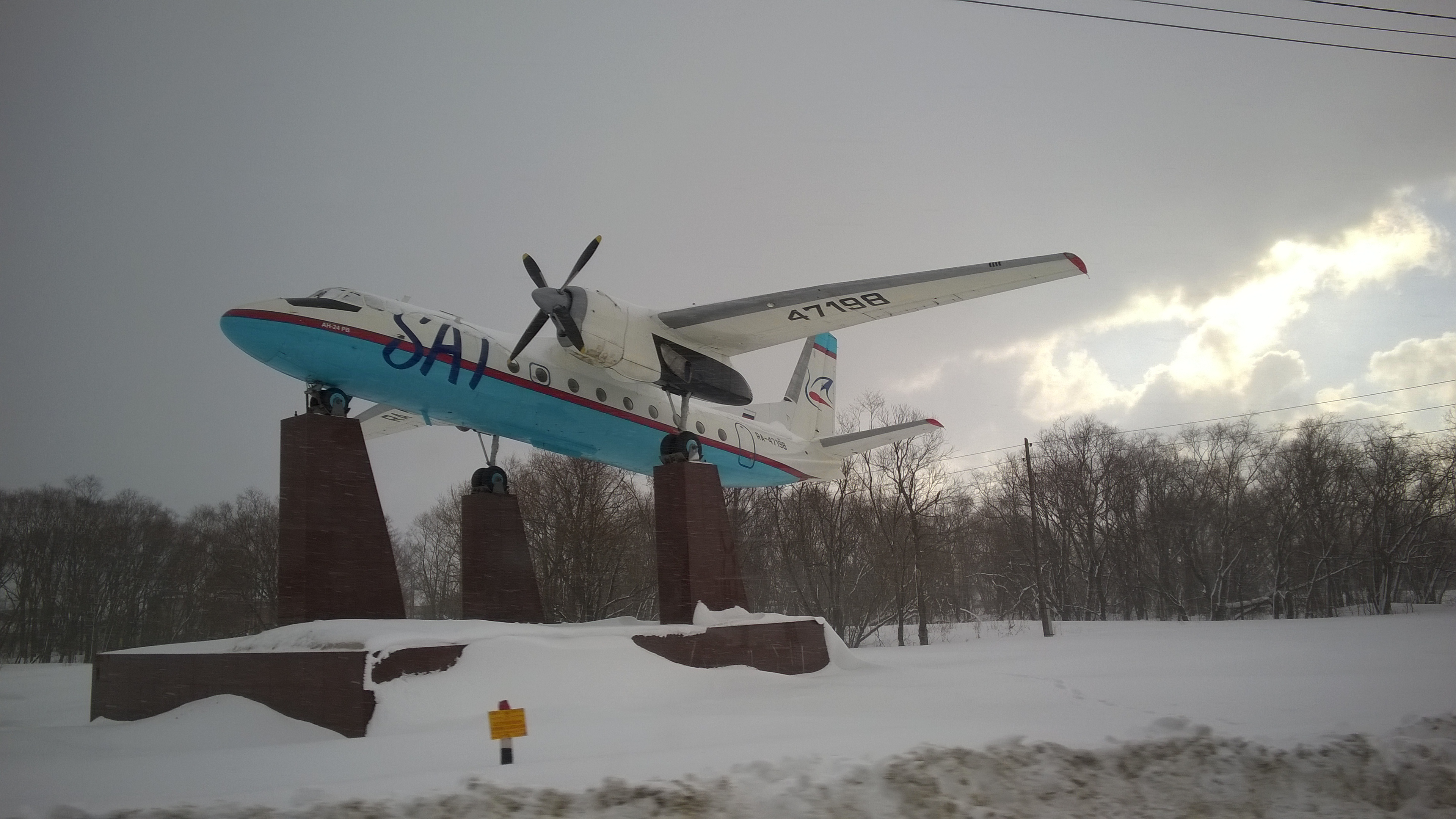 Фотография памятника самолету АН-24, на въезде в аэропорт города Южно-Сахалинск